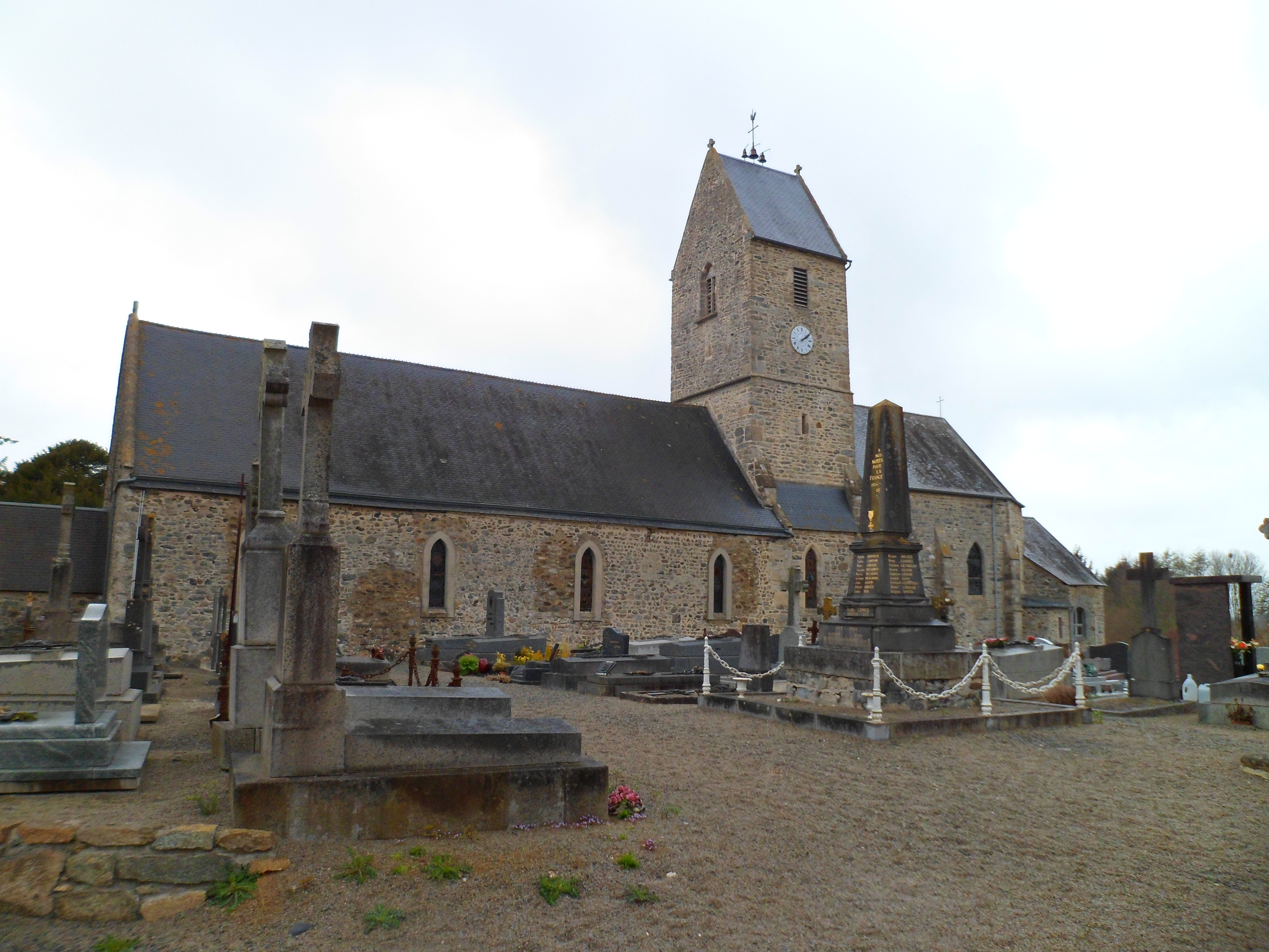 église Sainte-Vierge du Le Mesnilbus